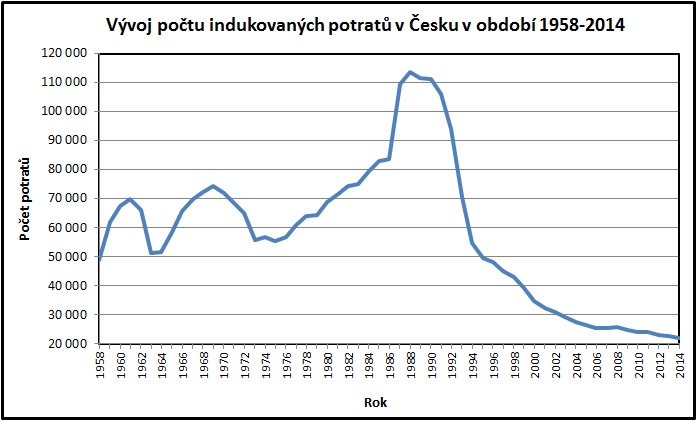 zdroj dat: ČSÚ